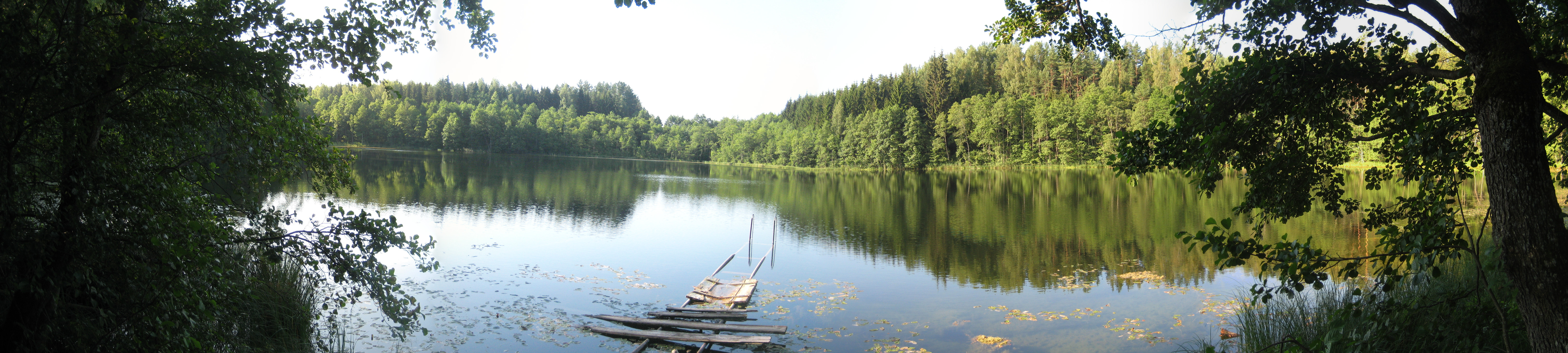 Degučių sen., Lithuania